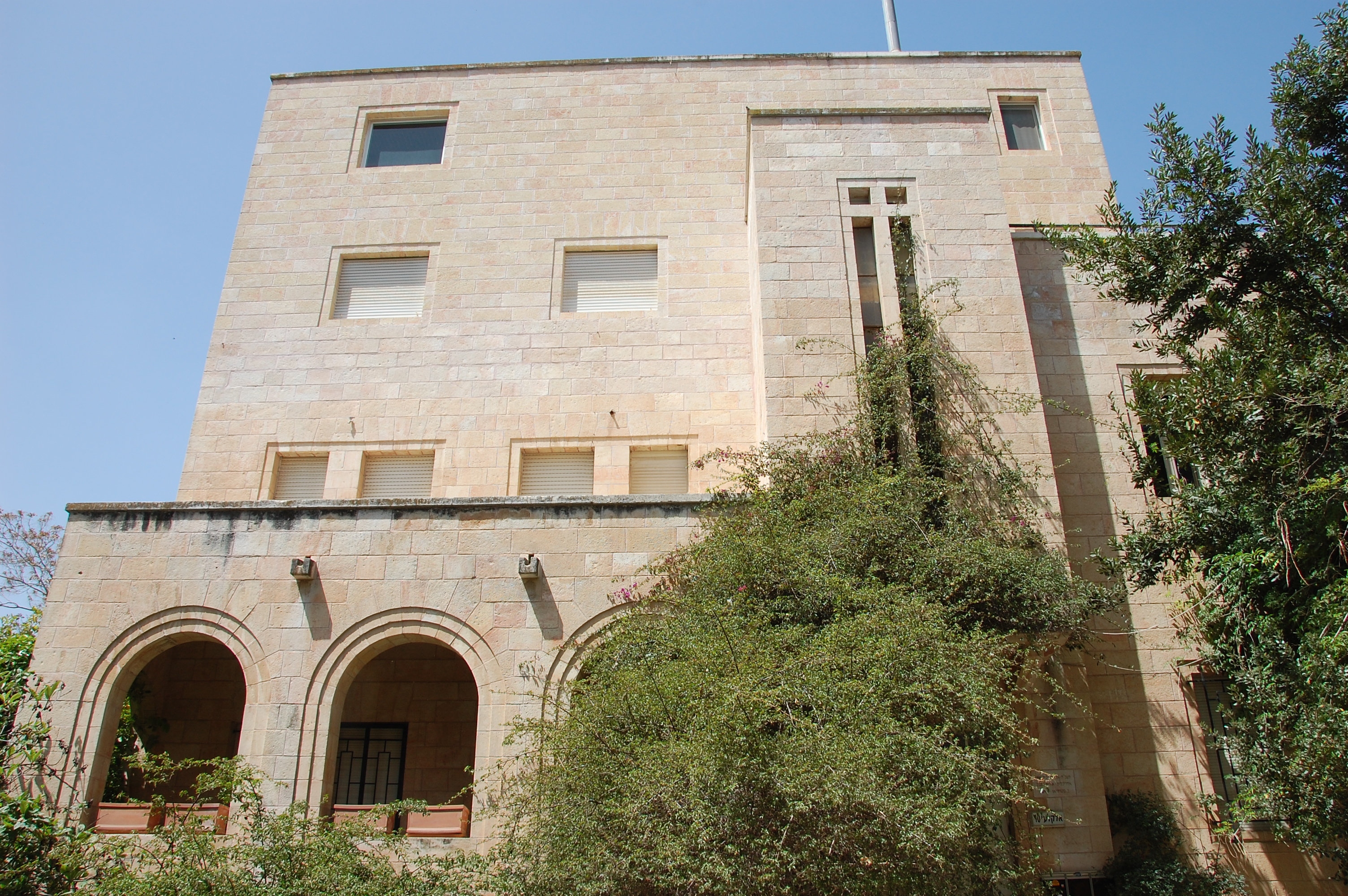 Beit Matossian